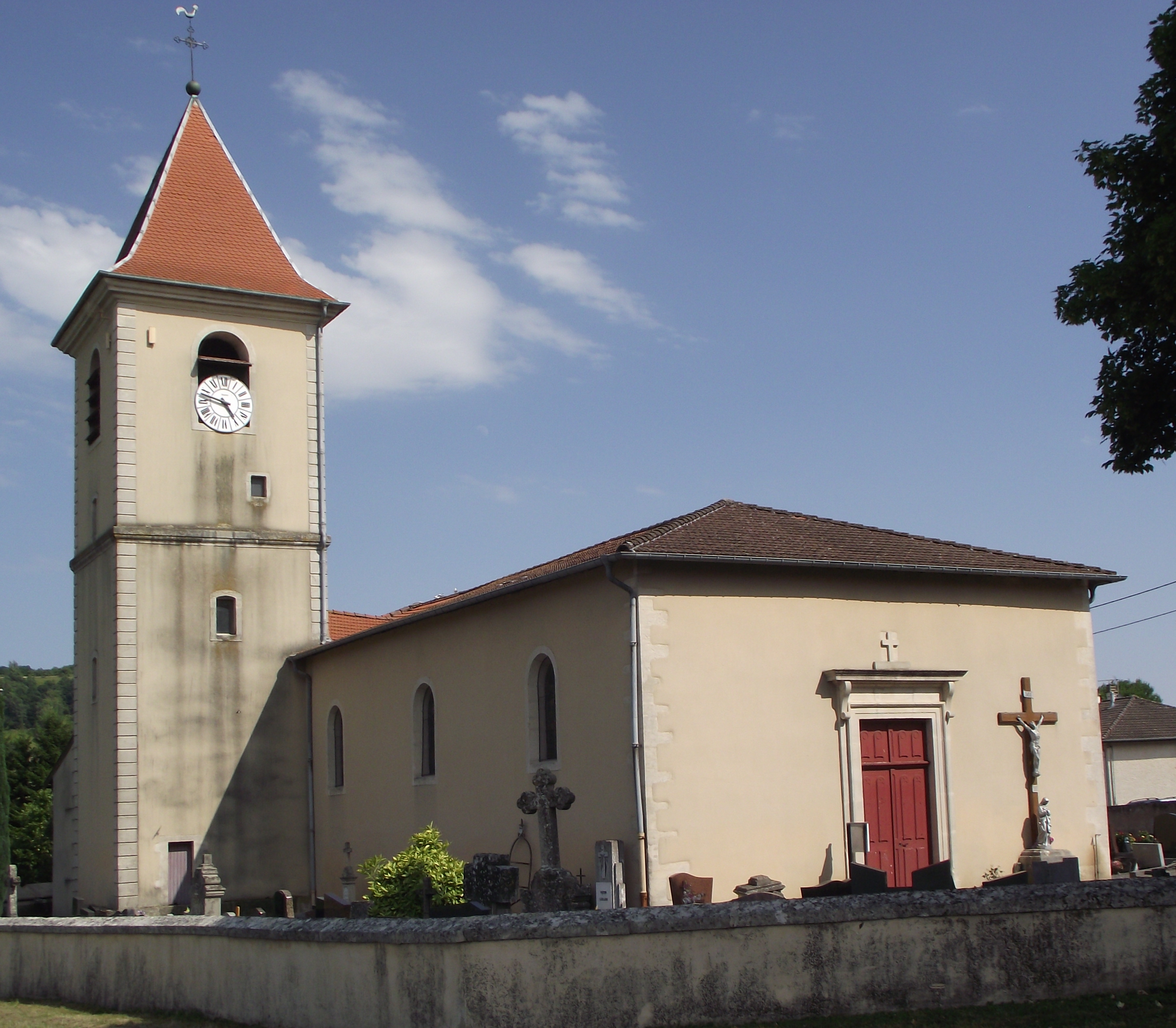 Eglise de Pagney-derriére-Barine vue de l'entrée